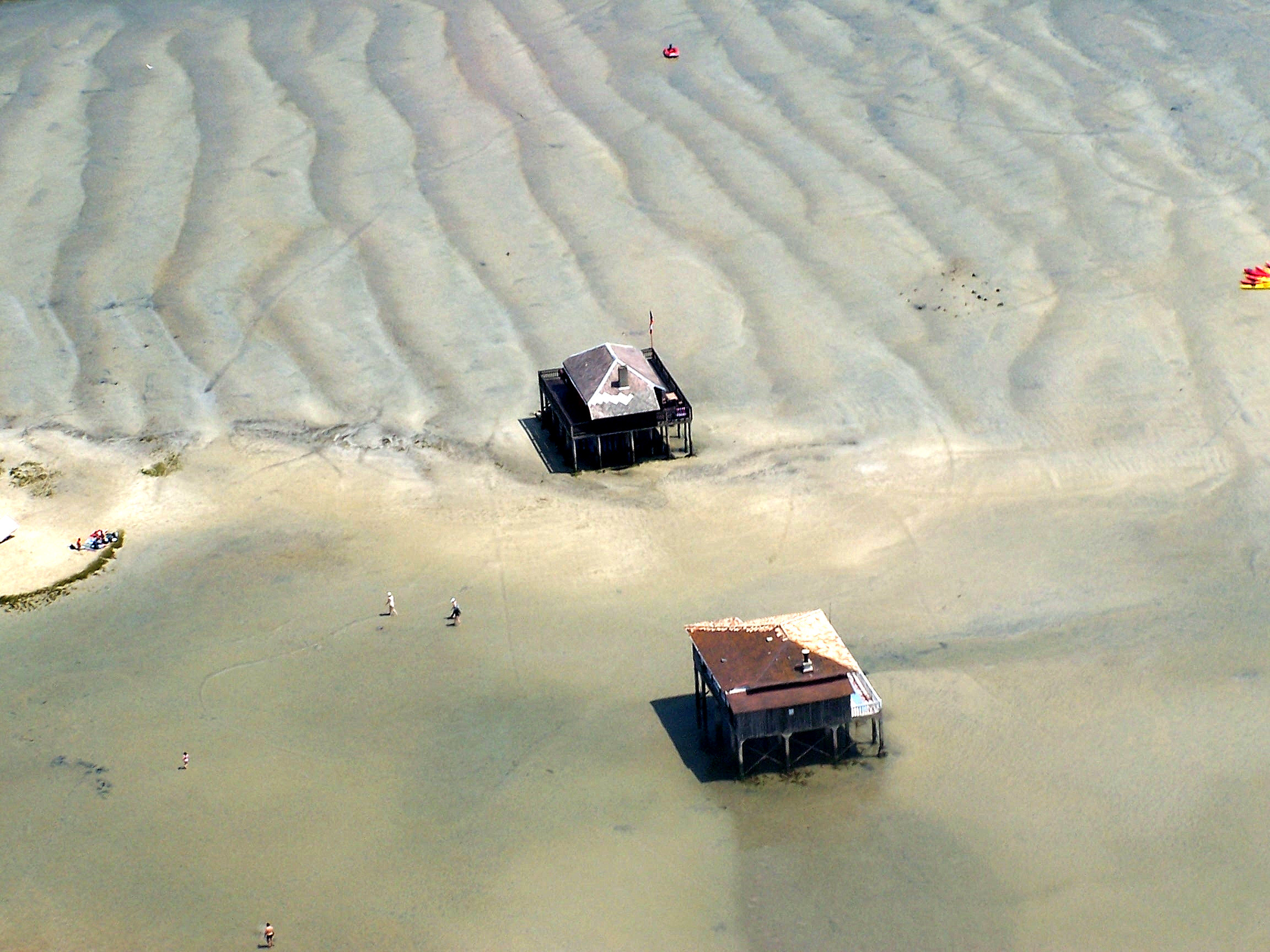 Cabana Chancada, Bacin d'Arcaishon. foto Jibi44